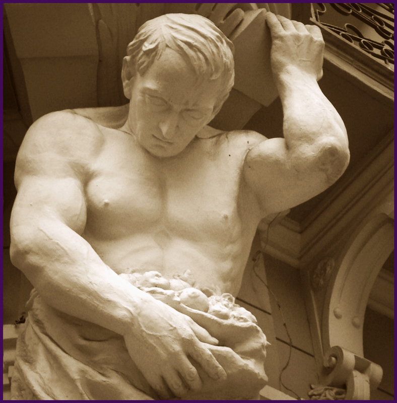 Atlante Jovem, detalhe da fachada da Confeitaria Rocco, Porto Alegre, Brasil. Obra de Giuseppe Gaudenzi